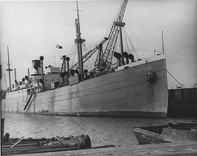 אוניית המעפילים קיבוץ גלויות